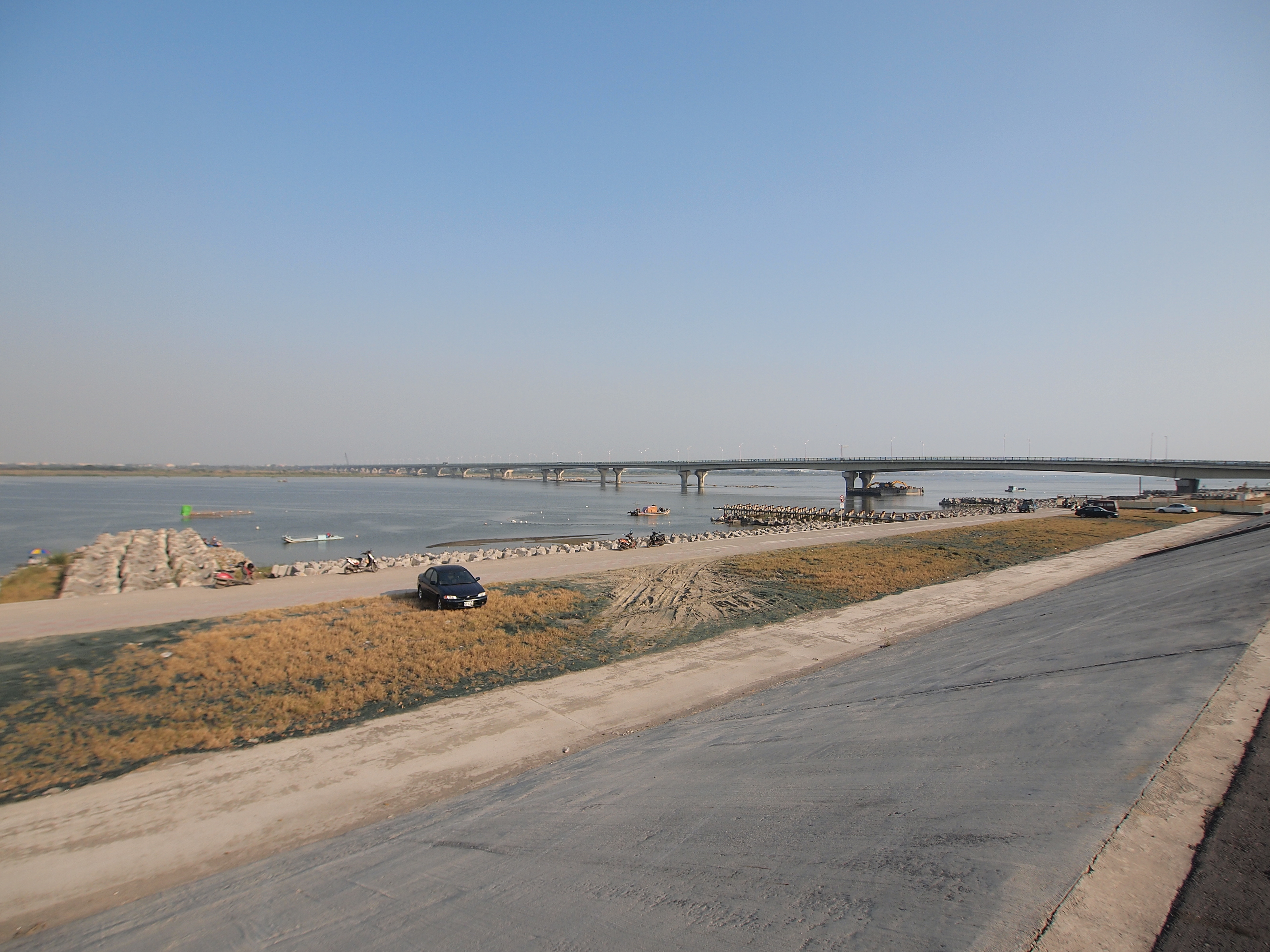 双园大桥 - Shuangyuan Bridge - 2012.02